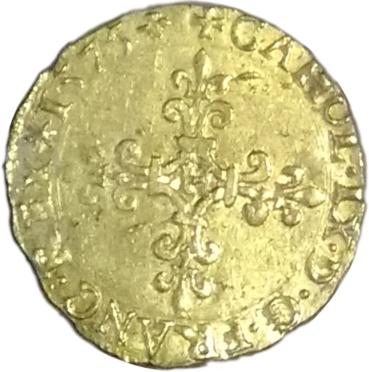 Écu Henri III